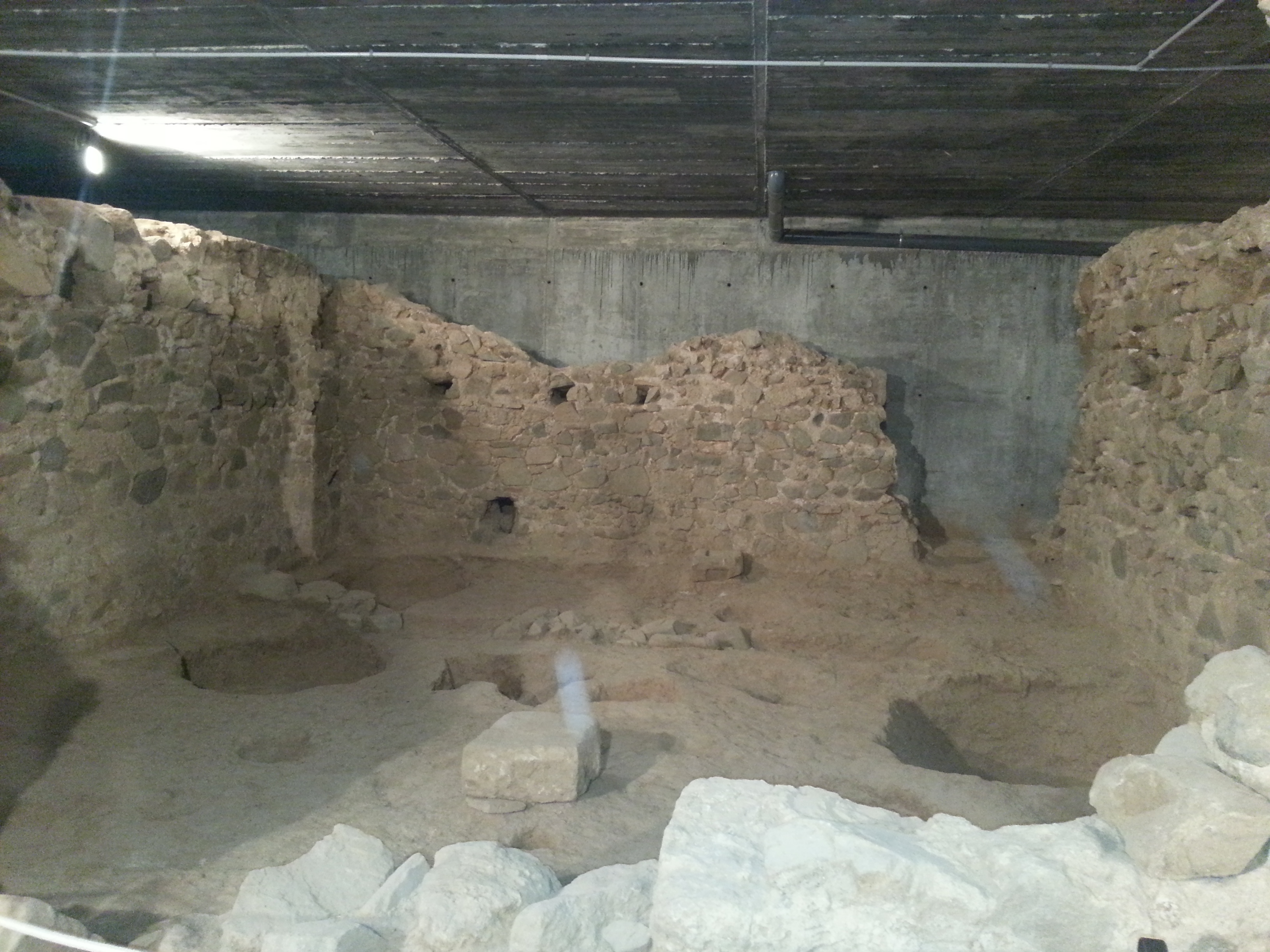 Jaciment roma de Can Farrerons Edifici octogonal. Premià de Mar